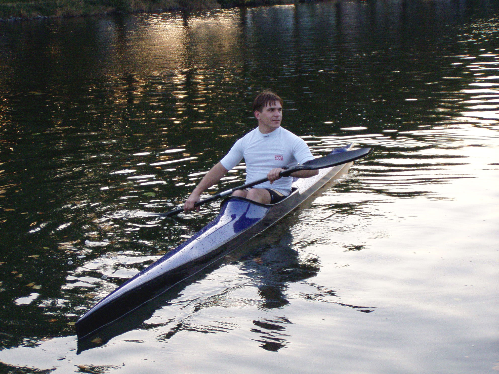 wedstrijdkajak voor lijnwedstrijden in carbon